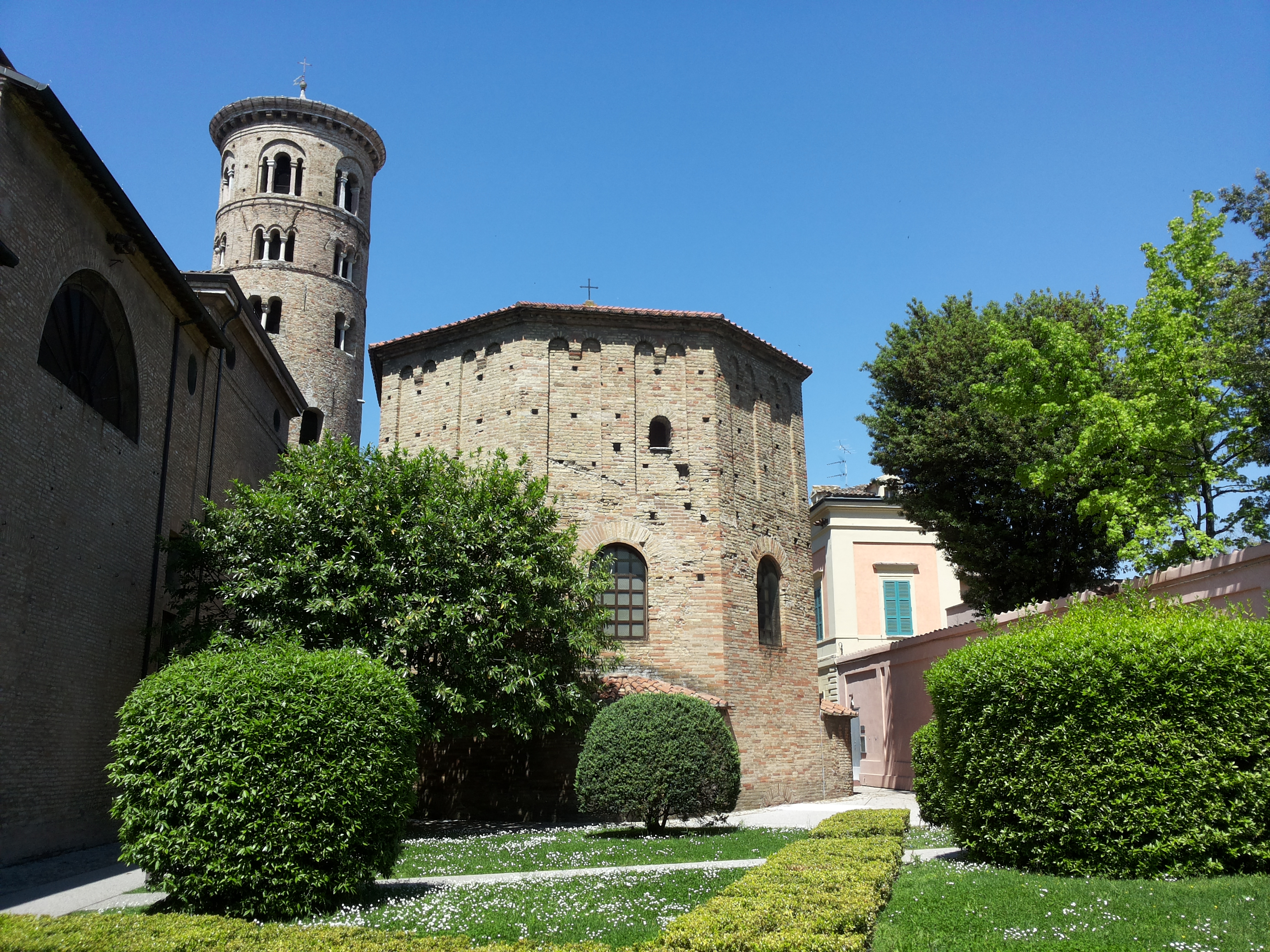 Battistero Neoniano - MIBAC This is a photo of a monument which is part of cultural heritage of Italy.